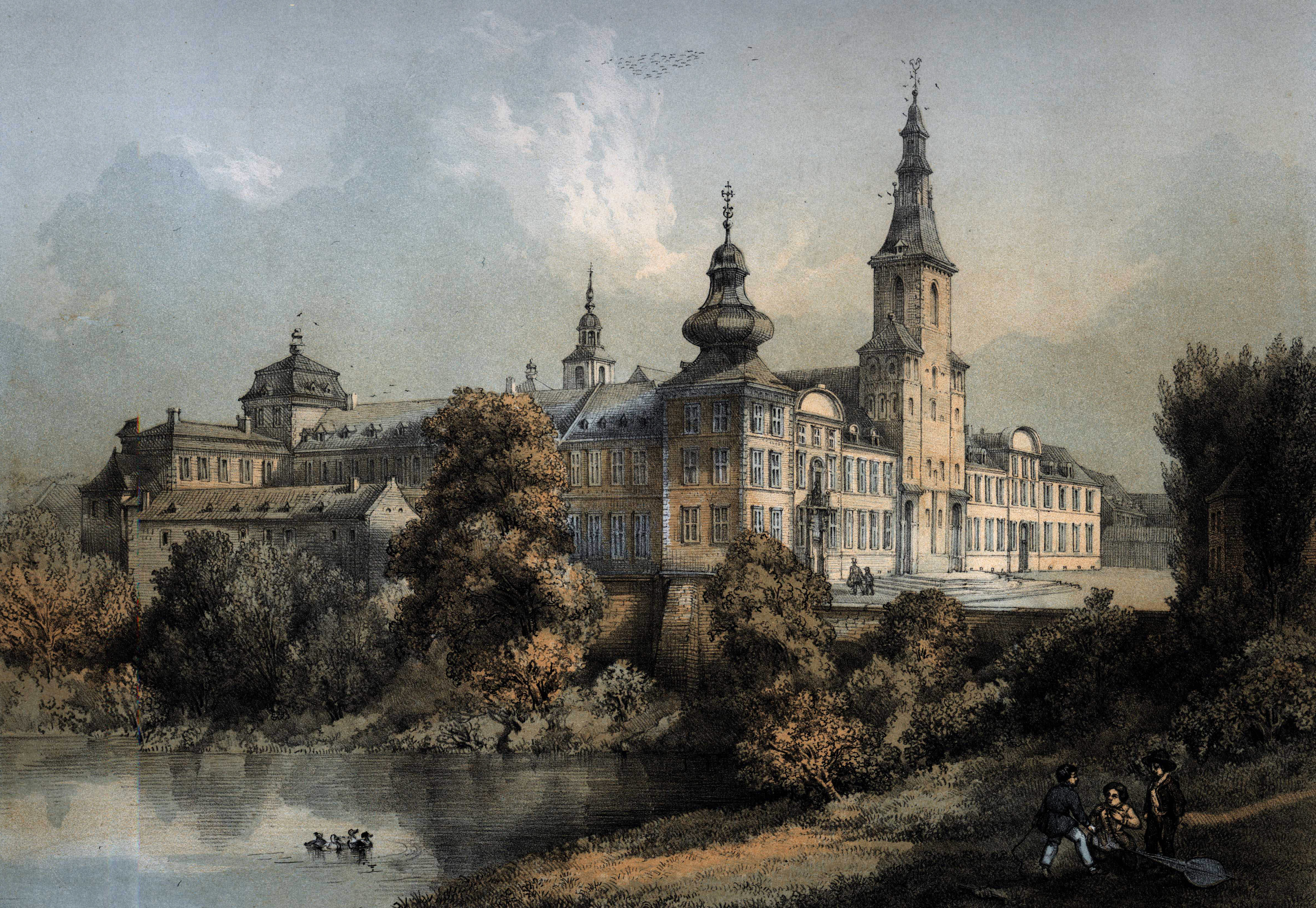 Kleurenlithografie door Alexander Schaepkens van de Abdij Rolduc en omgeving. Gepubliceerd in 1852 in een boek met 8 lithografieën, getiteld: Rolduc et ses Environs, dessinés d'après nature, et lithographiés par Alexandre Schaepkens. Paysages et Monuments du Duché de Limbourg, avec texte archéologique et historique. Collectie RHCL Maastricht, RAL P-0050-001.